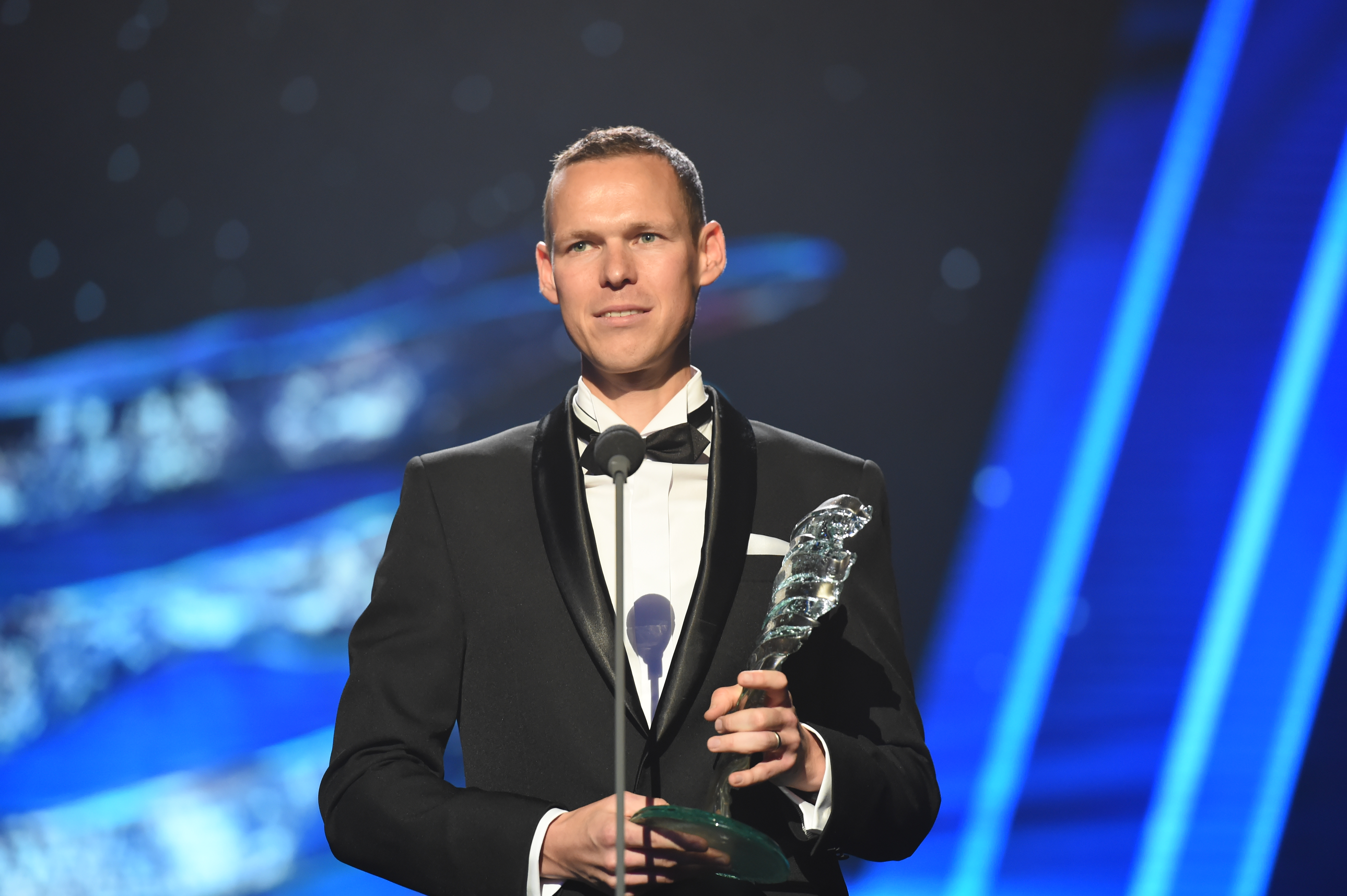 Matej Tóth, Krištálové krídlo 2015.